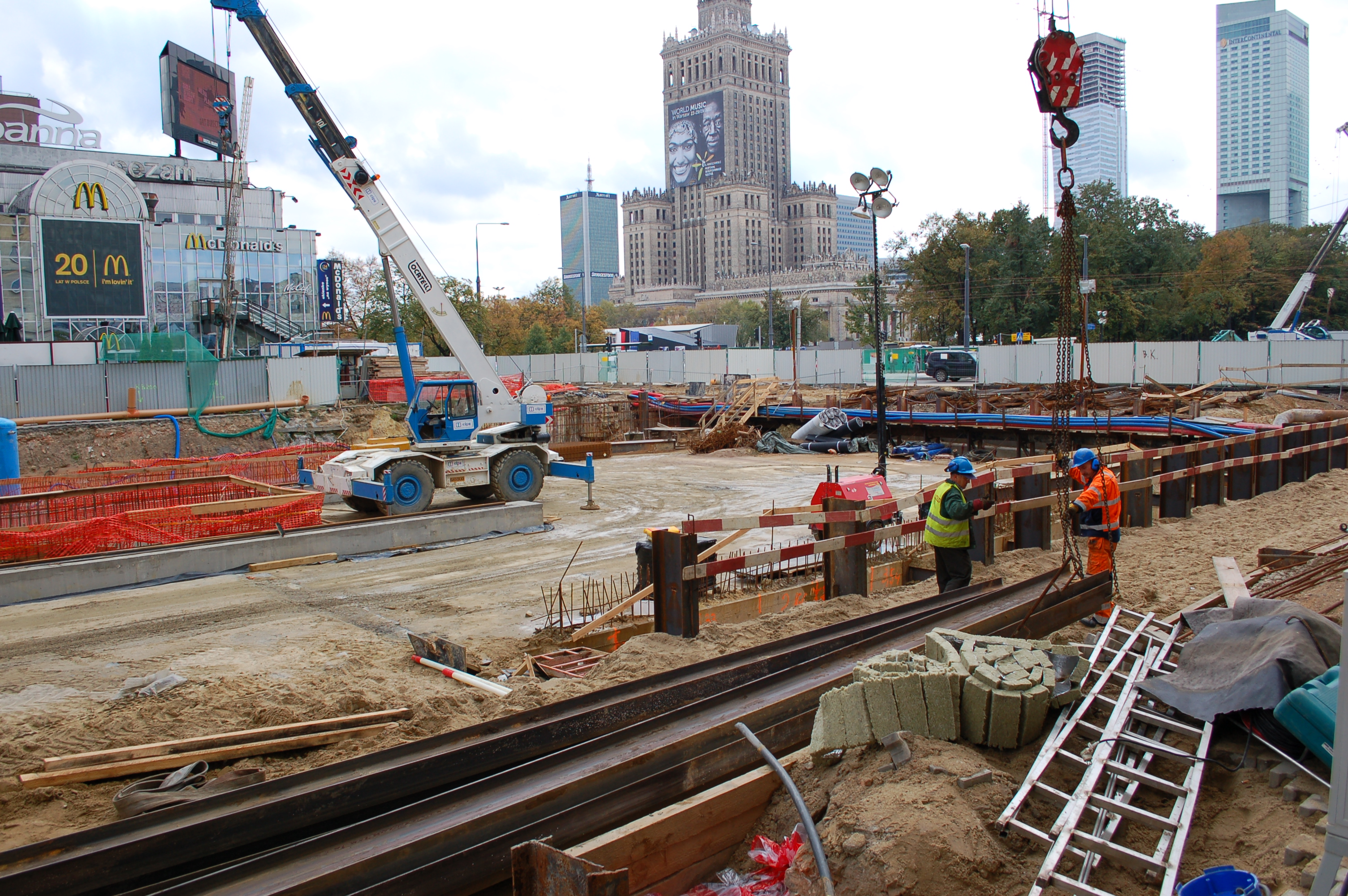 Metrobau Warschau